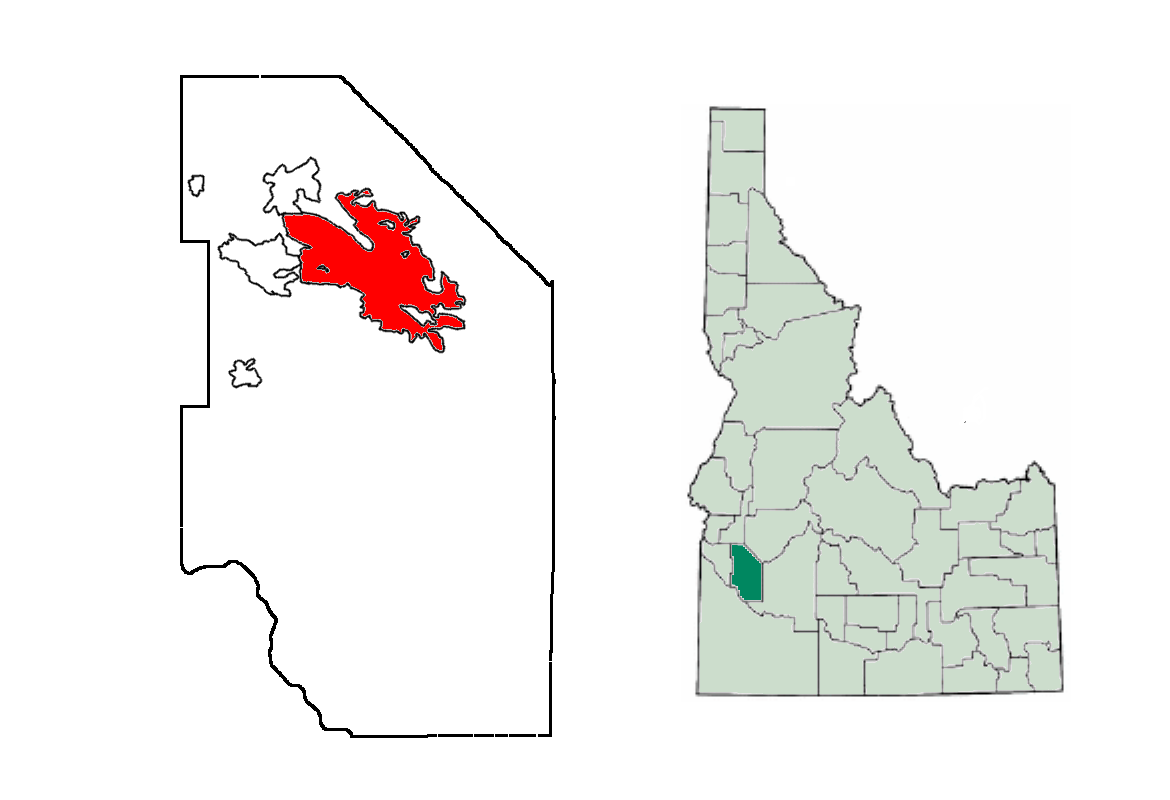 Volapük: Topam in tat: Idaho.